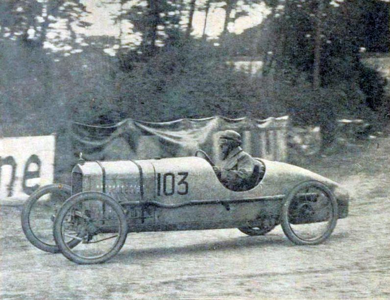 Marcel Violet au Bol d'or 1927 sur Leroy-Violet, vainqueur en 750cc3.